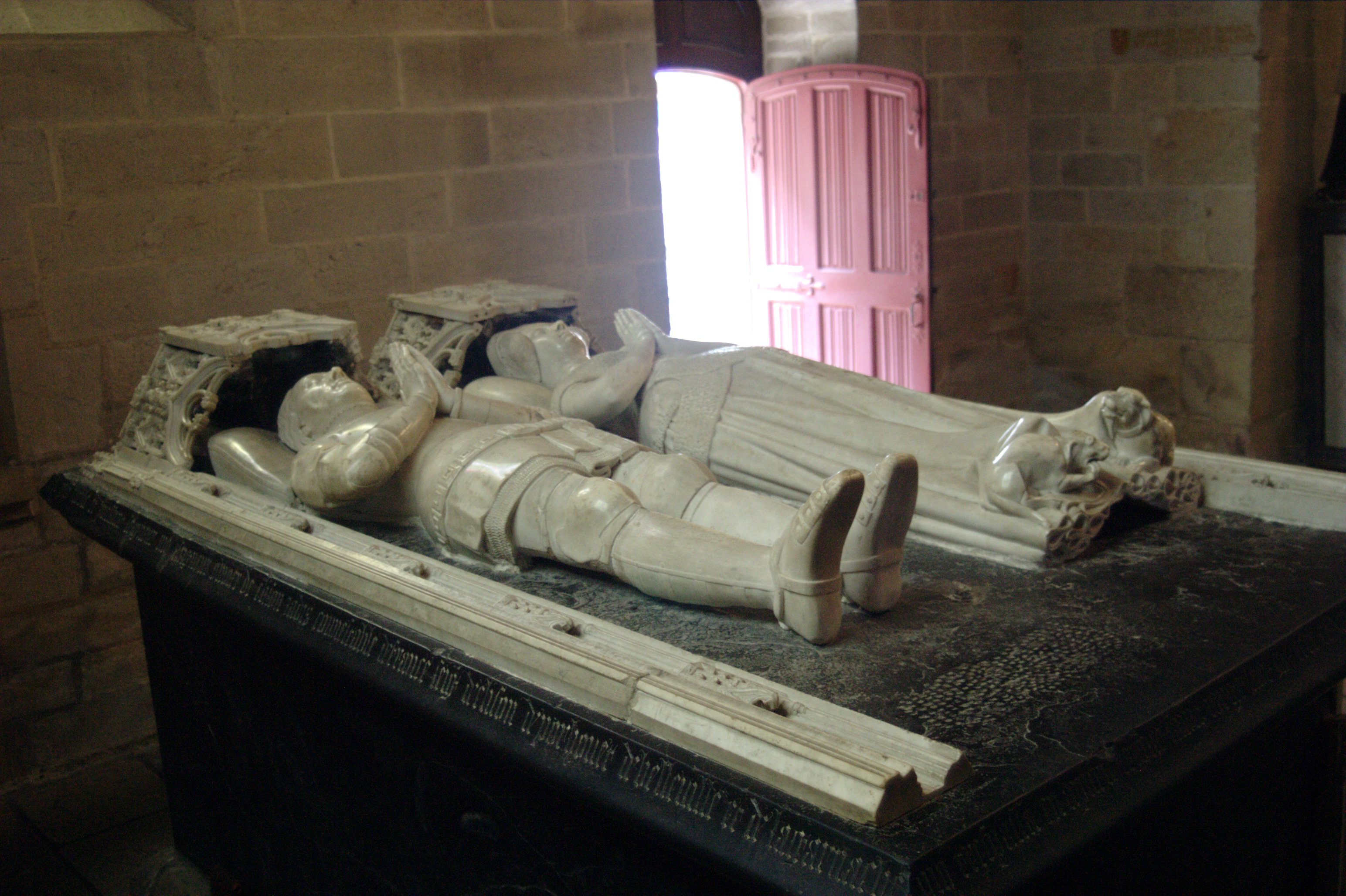 Gisants d'Olivier V de Clisson,et de Marguerite de Rohan